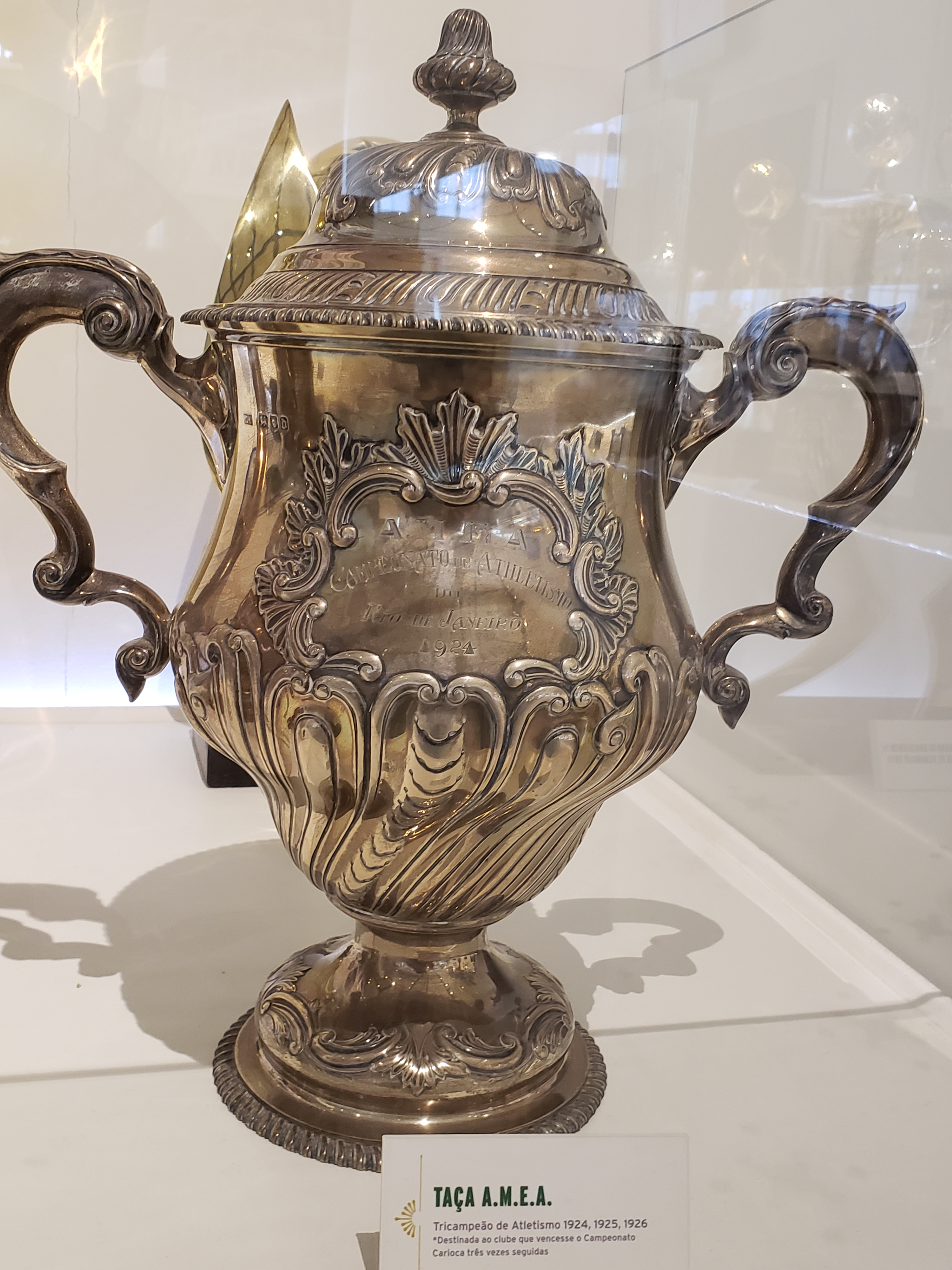 Taça AMEA de Atletismo, destinada ao primeiro clube que conquistasse o Campeonato Carioca de Atletismo a partir de 1924, de posse do Fluminense Football Club.